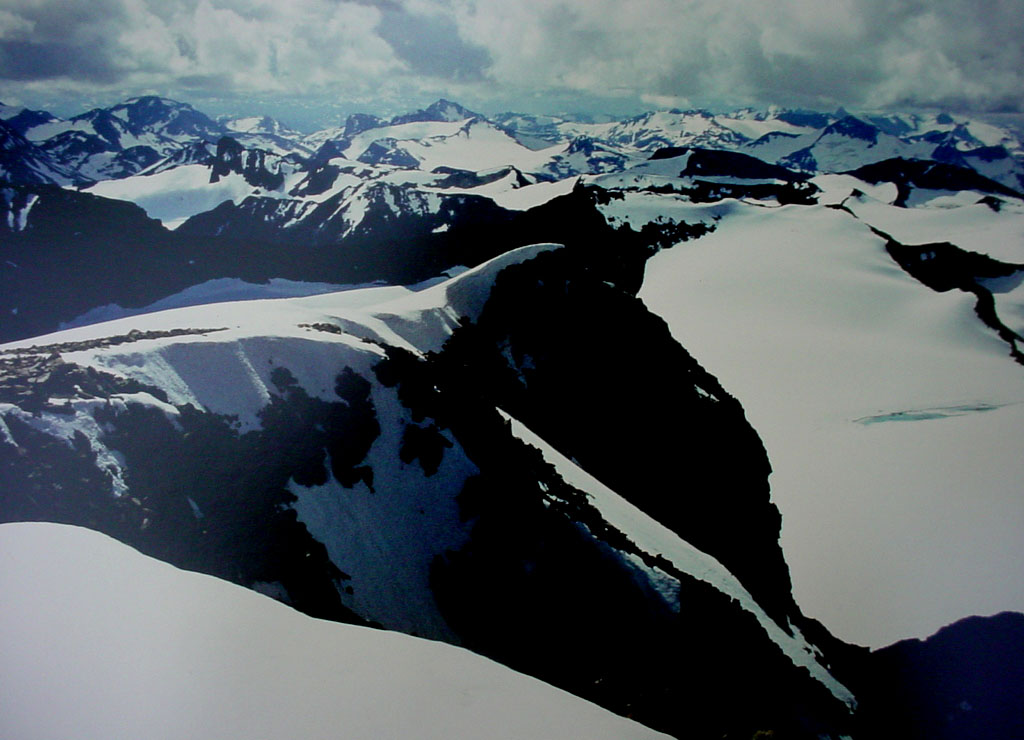 Utsikt fra Galdhøpiggen, Jotunheimen, Noreg